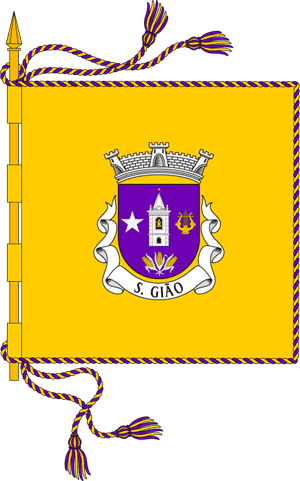 Bandeira/Galhardete da Freguesia de São Gião, Concelho de Oliveira do Hospital, Distrito de Coimbra, Portugal